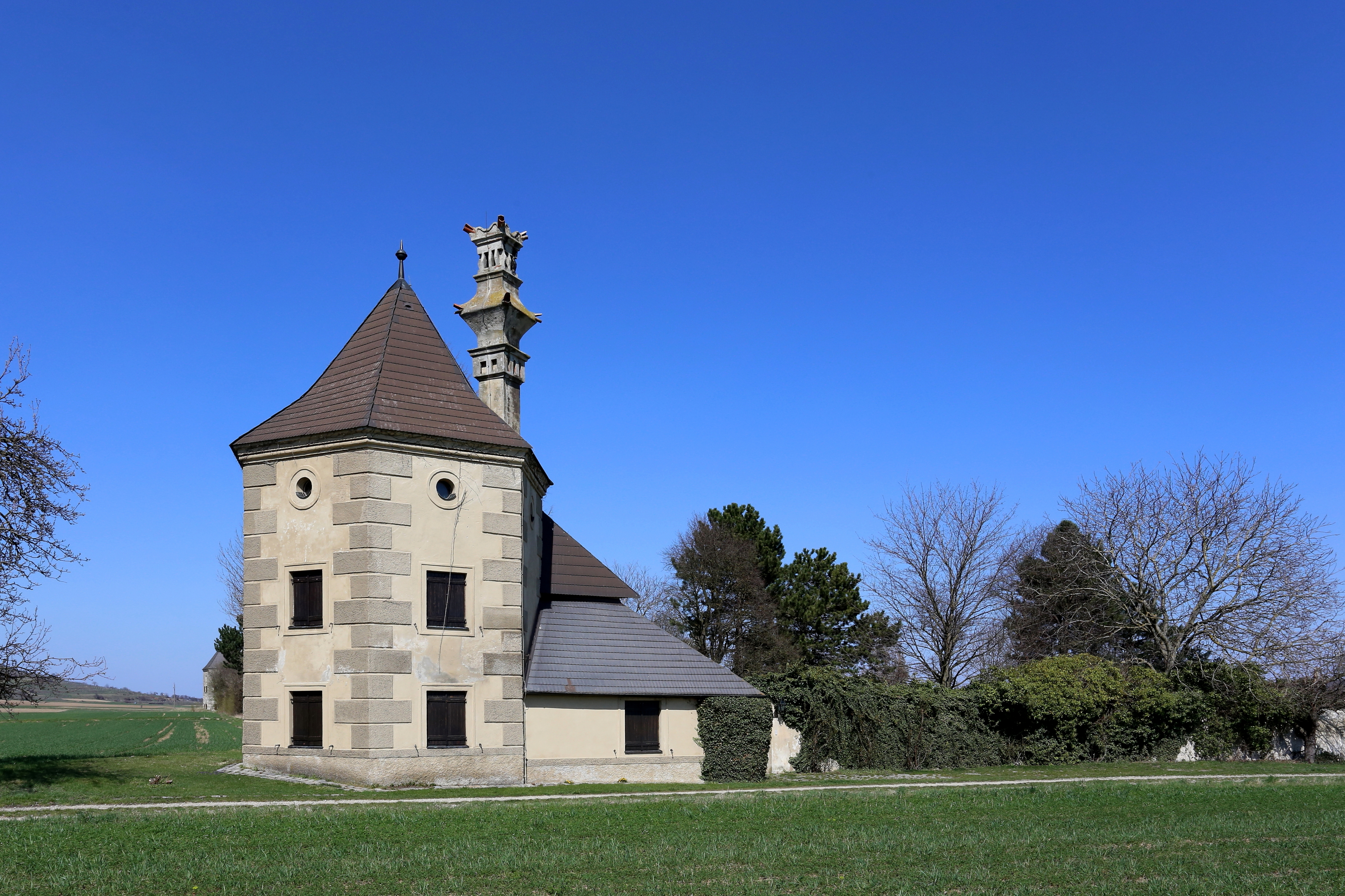 Der südwestliche Eckturm der Fasanerie des niederösterreichischen Schlosses Walpersdorf. Die Fasanerie wurde rund 800 Meter südöstlich des Schlosses in den Jahren 1577 bis 1619 errichtet.